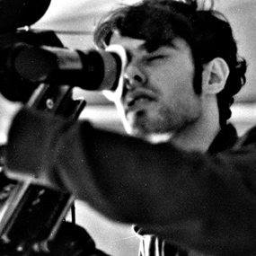 Director de cine español nacido en 1980, autor de los films "Metamorfosis" e "Idiotas" entre otros.